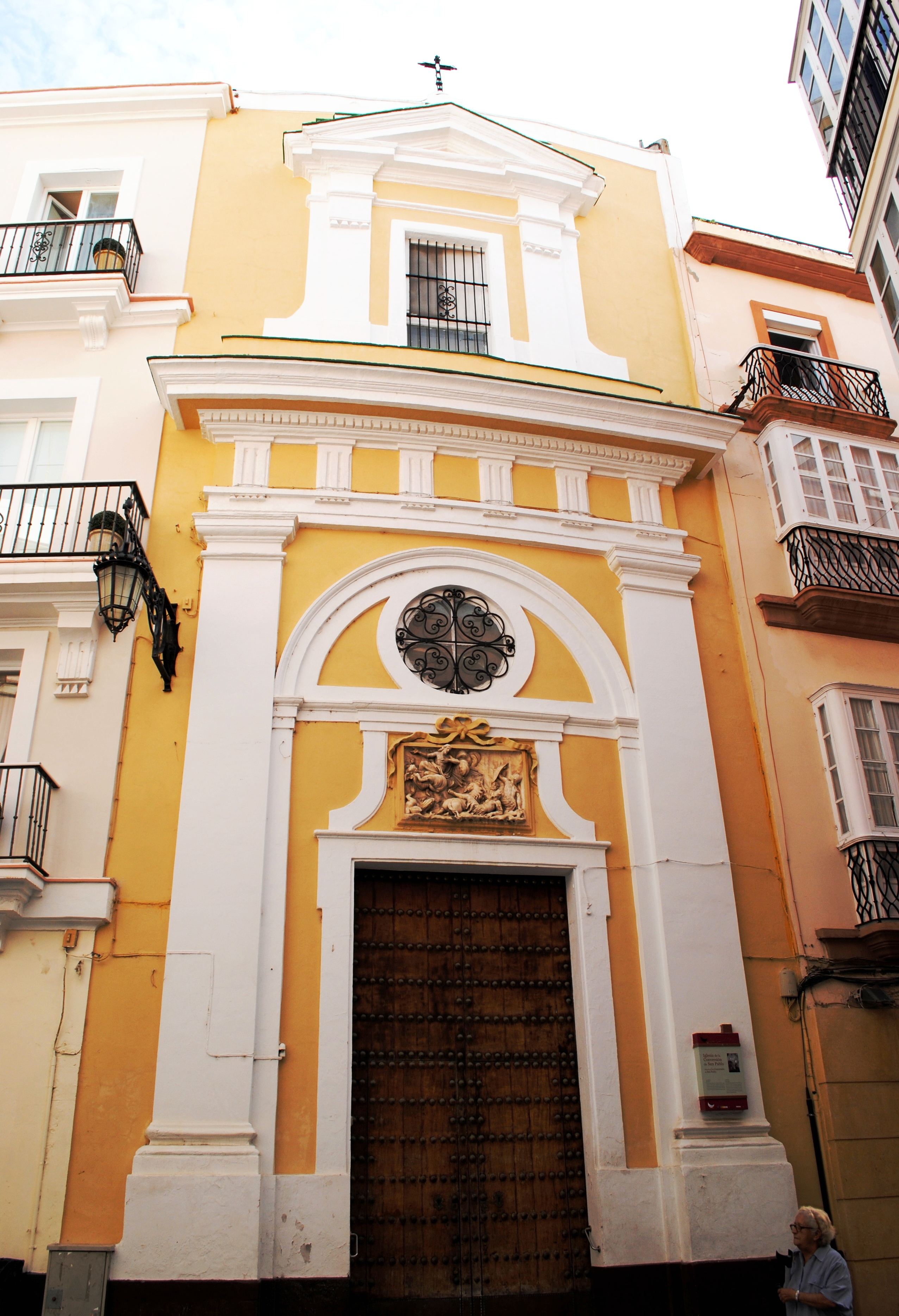 Iglesia de la Conversión de San Pablo, Cádiz. Sirve a la Casa-Institución de las Arrepentidas, fundada a finales del siglo XVII por doña Jacinta Martínez de Zuloaga. El templo fue construido entre 1679 y 1698 por Benjumeda, según planos de Torcuato Cayón. En 1787, a propuesta del entonces Obispo Escalzo y Miguel fue ampliado. El edificio es de estilo neoclásico y tiene una sola nave cubierta con bóveda de cañón y fajones. Sobre la capilla mayor hay una cúpula sobre pechinas y los muros se decoran con pilastras toscanas adosadas. En el interior los retablos son de mármoles de colores en los órdenes corintio y compuesto. En el altar mayor es digno de mención la escultura del Ecce-Homo, obra del escultor barroco sevillano José Montes de Oca.